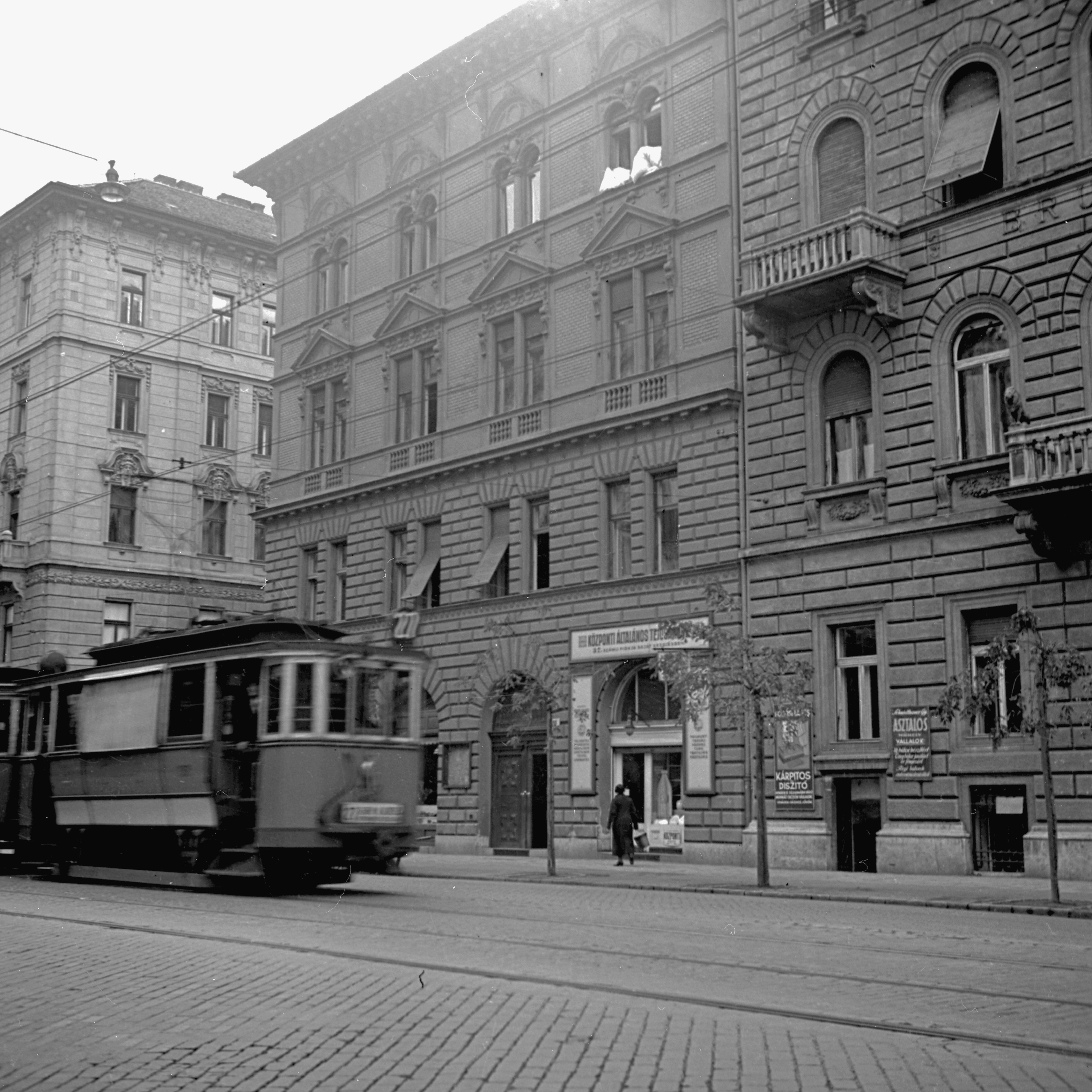 Damjanich utca 37. Location: Hungary, Budapest VII. Tags: tram, Budapest, street view Title: Damjanich utca 37.